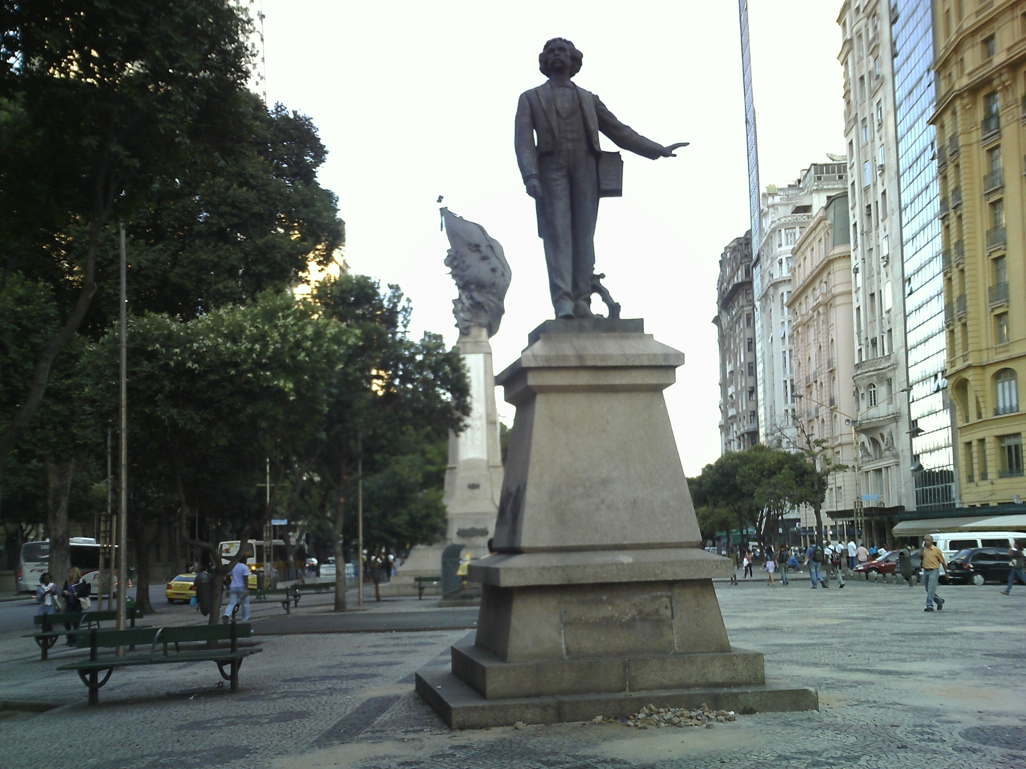 Estátua de Carlos Gomes.